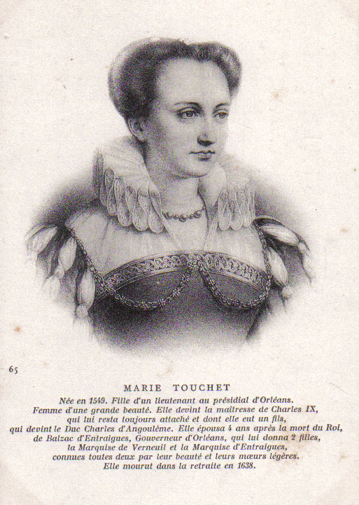 Marie Touchet, archives personnelles familiales